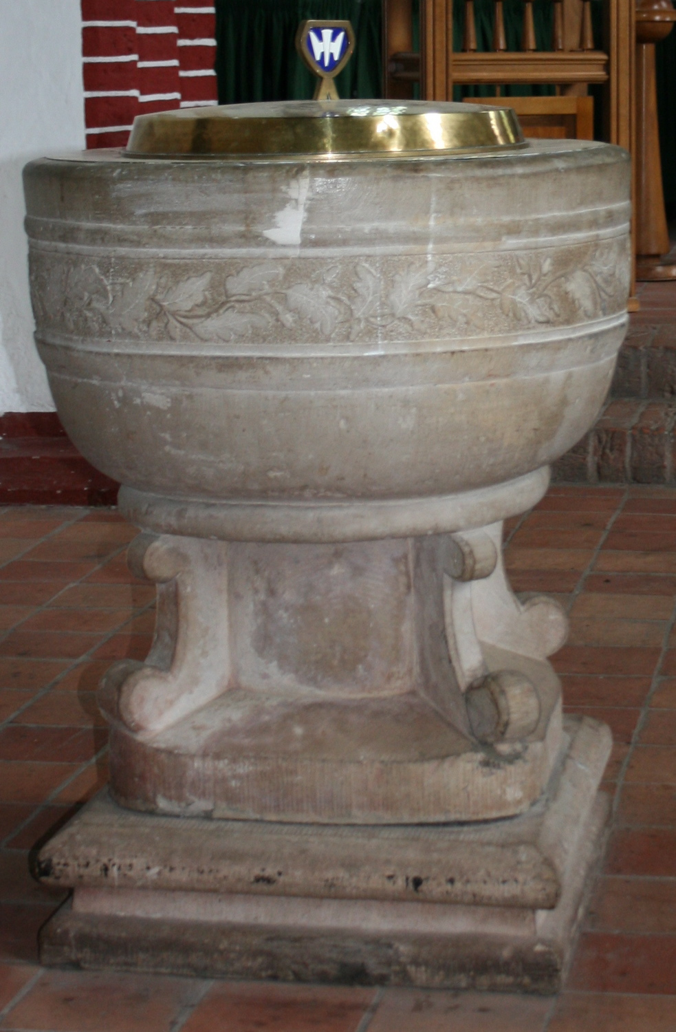 Kreisbahn Aurich Taufstein der Kirche Victorbur